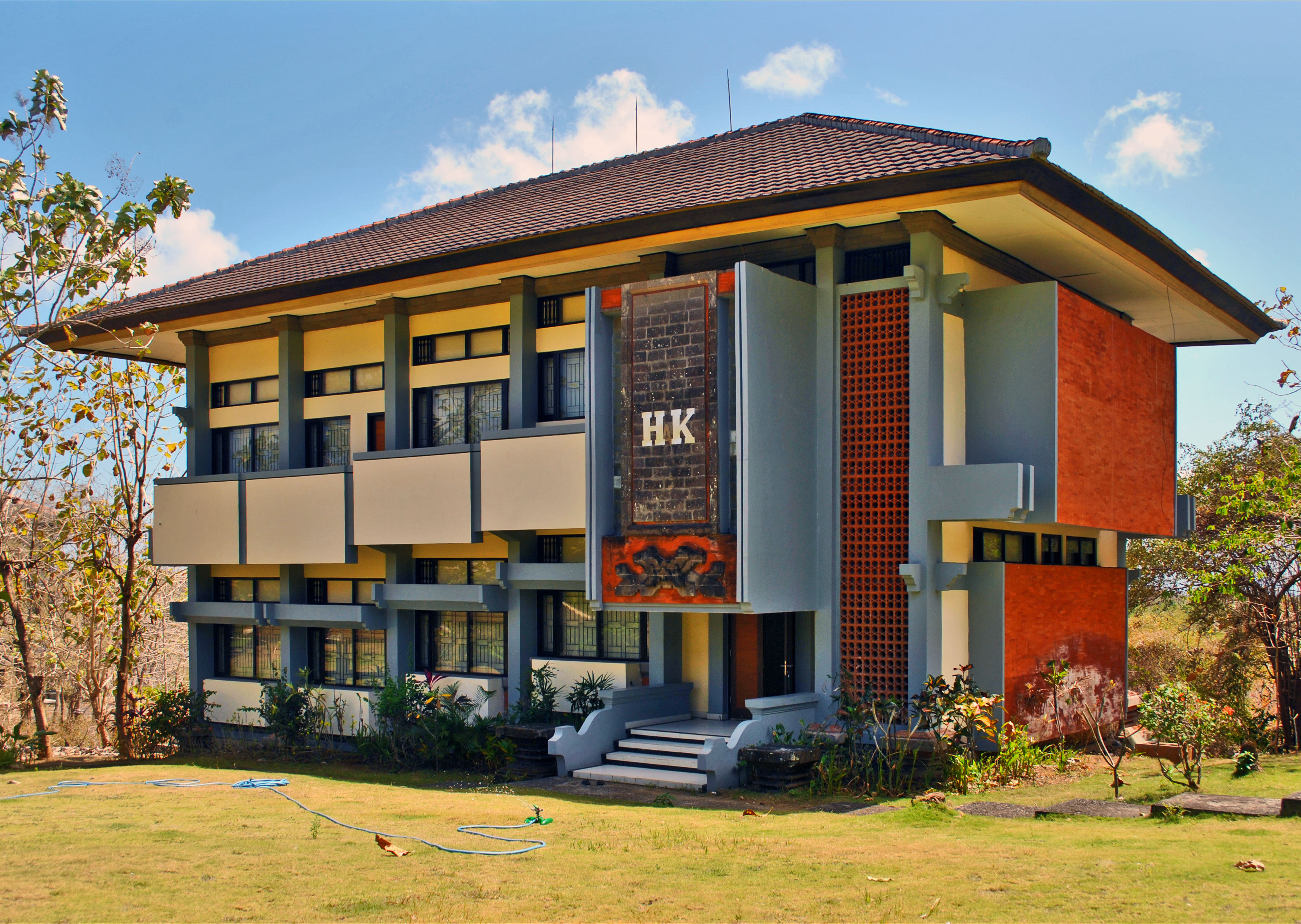 Salah satu gedung di Universitas Udayana Kampus Bukit A building in Bukit campus of Universitas Udayana Original image on Panoramio